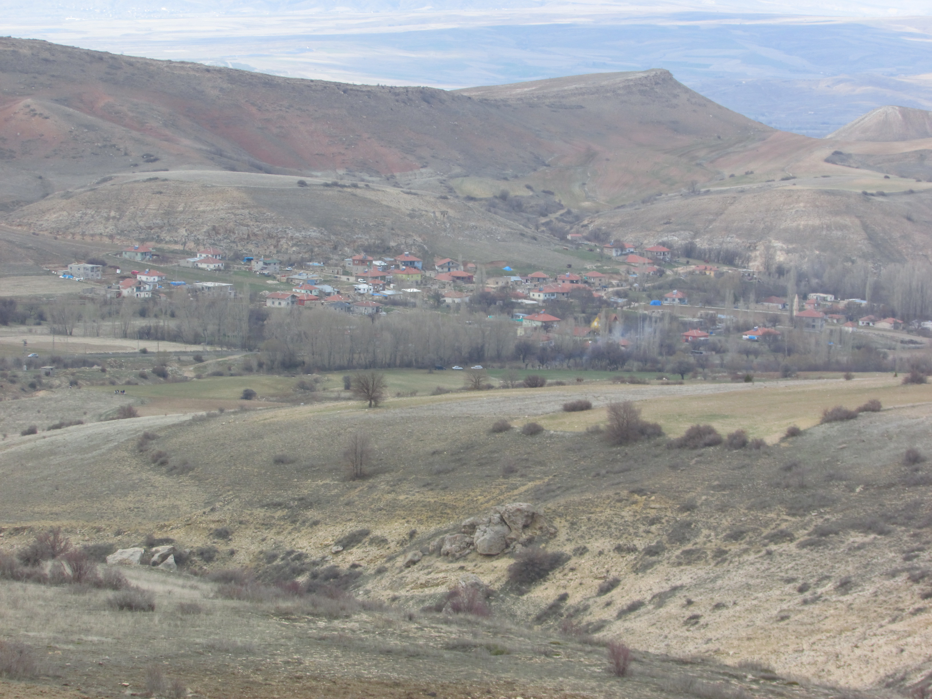 Yayla yolu,Alan yer isimli mevkiiden Manavuz köyünün görünümü